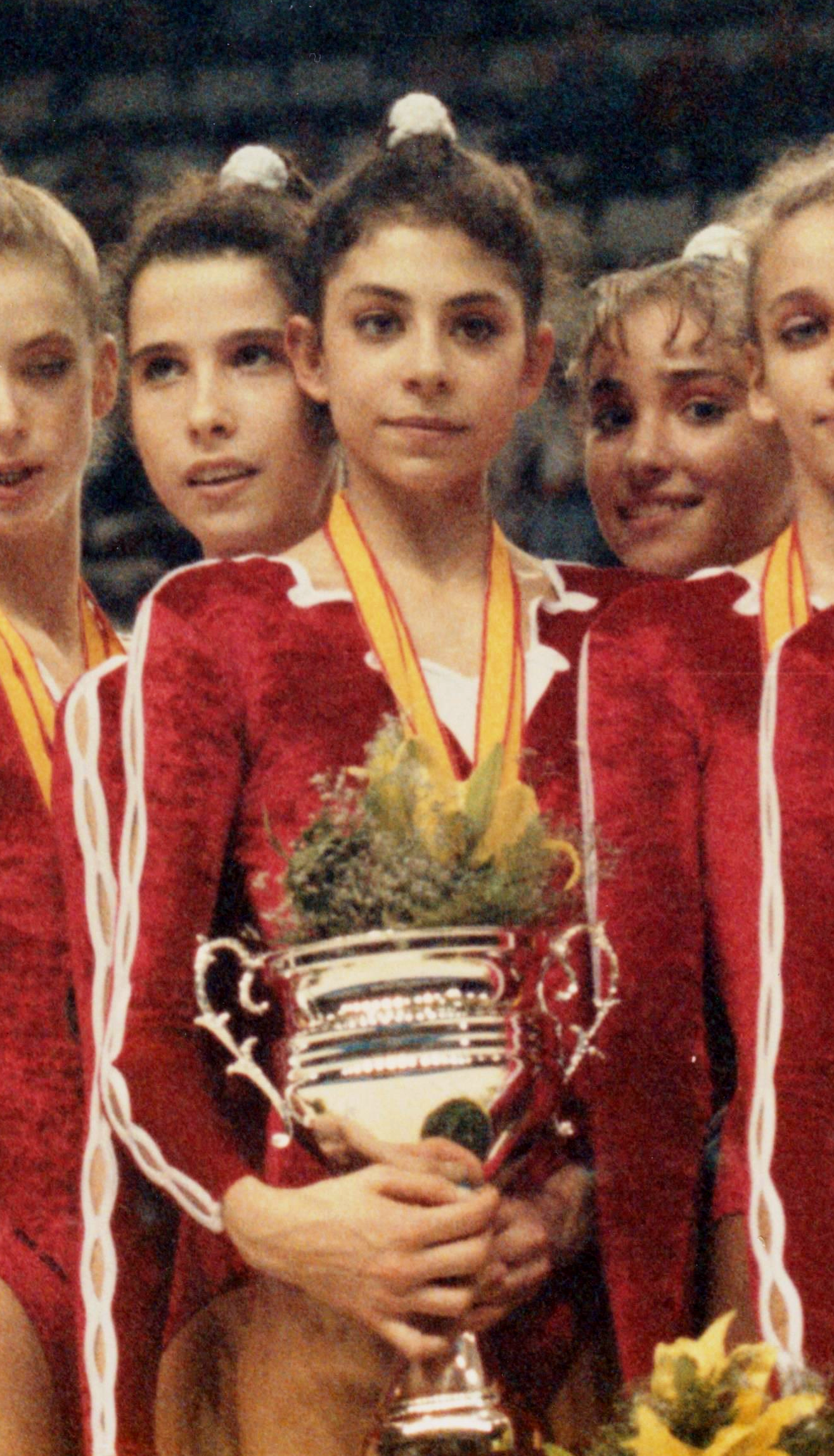 Cristina Martínez en el torneo Group Masters de Alicante en 1993.